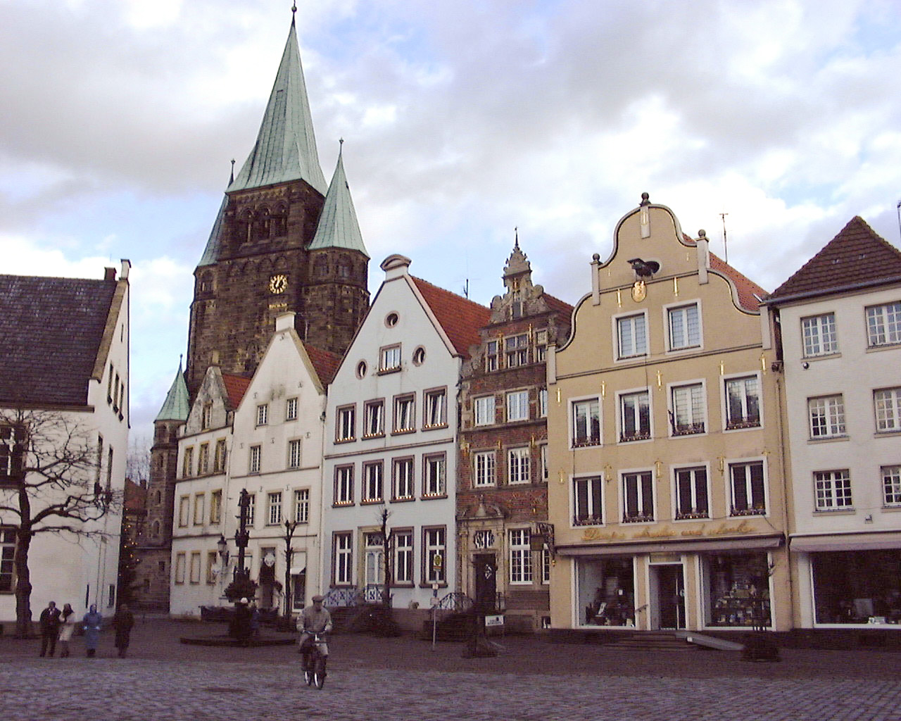 Ostseite des Warendorfer Marktplatzes mit Laurentiuskirche, Dezember 1999